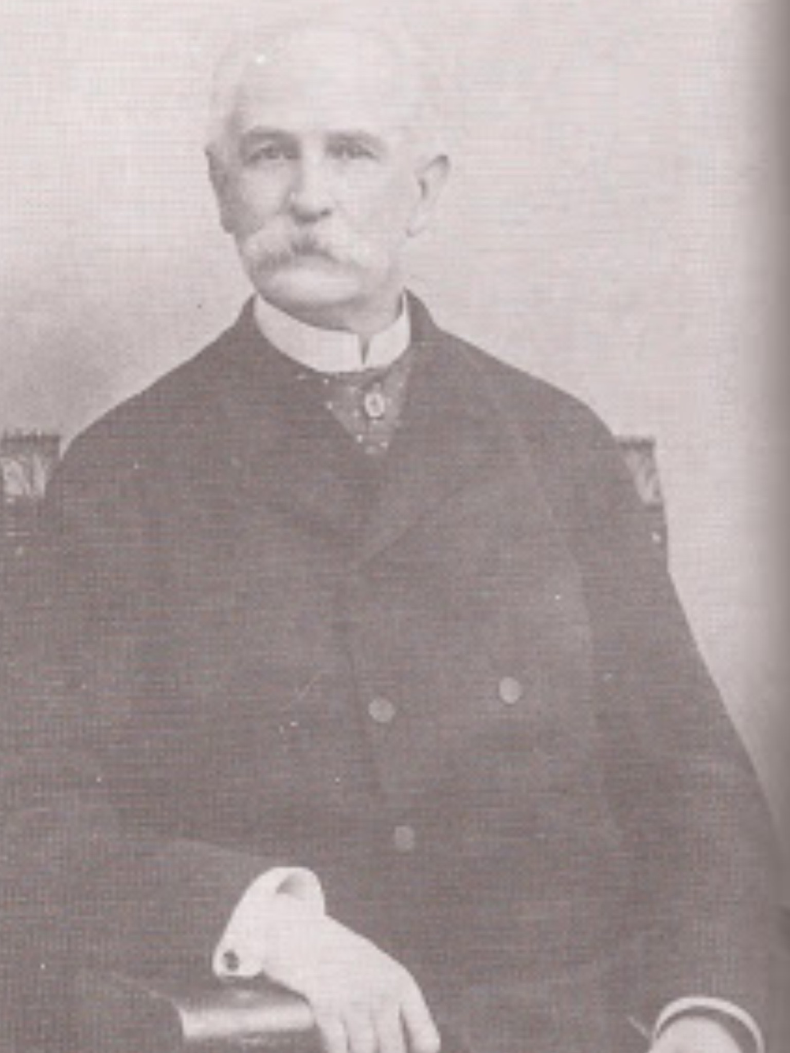 Patricio Larraín Gandarilla en 1890 de 73 años de edad.